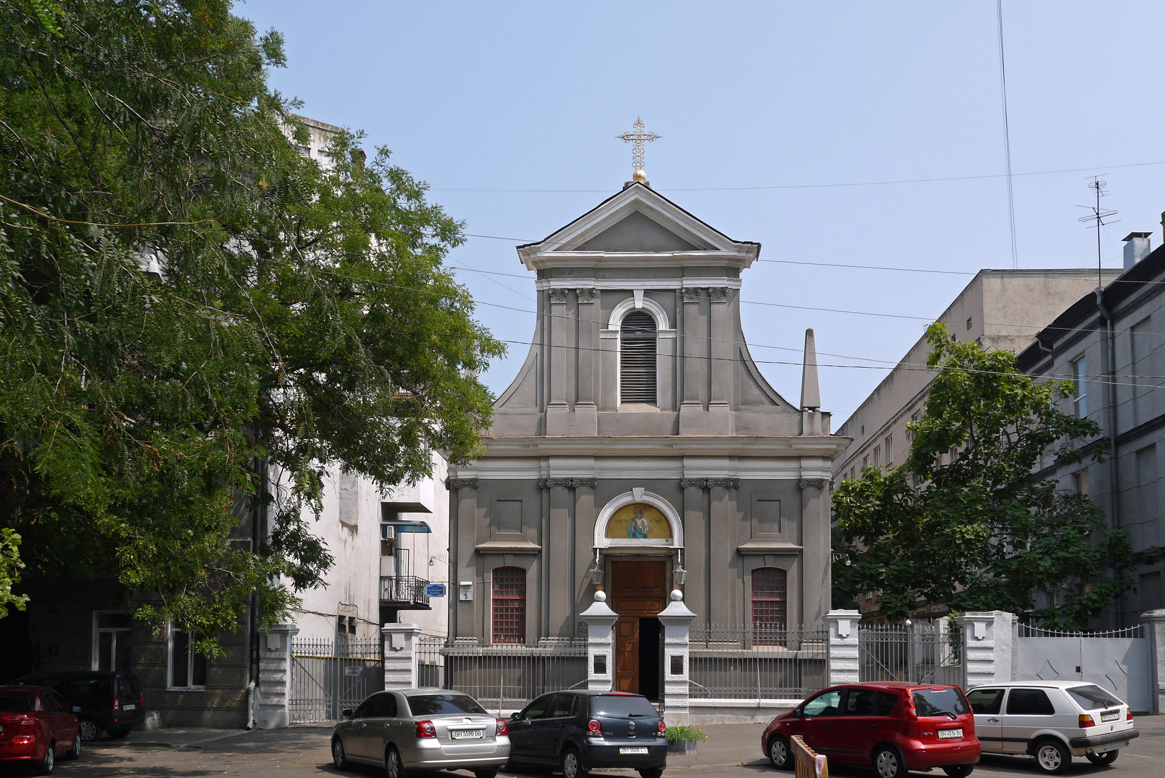 Костьол св. Петра, Одеса, вул. Гаванна, 5